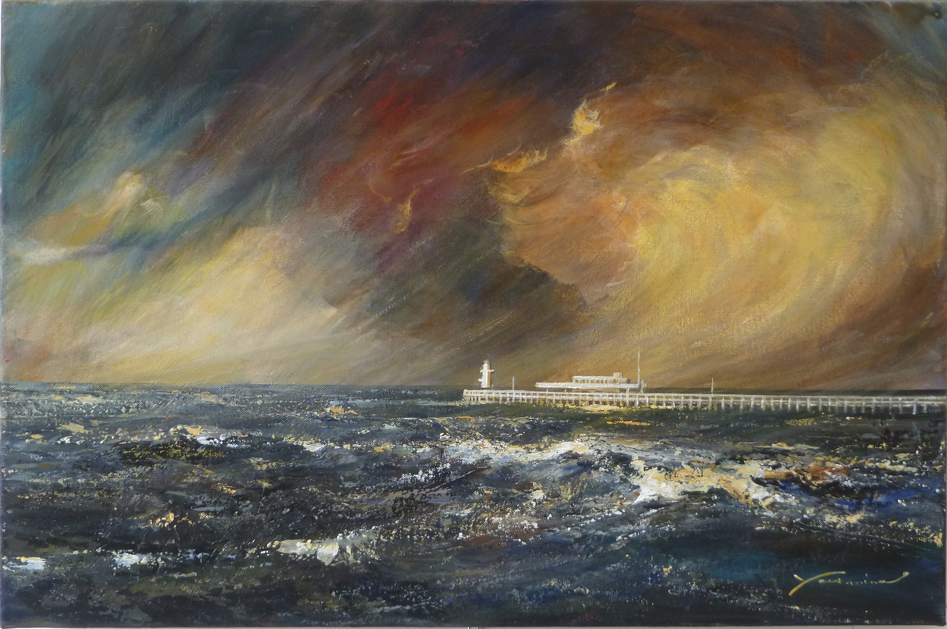 "Staketsel van Oostende" (2013) door de Belgische kunstschilderes Yasmina